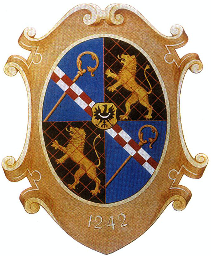 Wappen der Abtei Grüssau